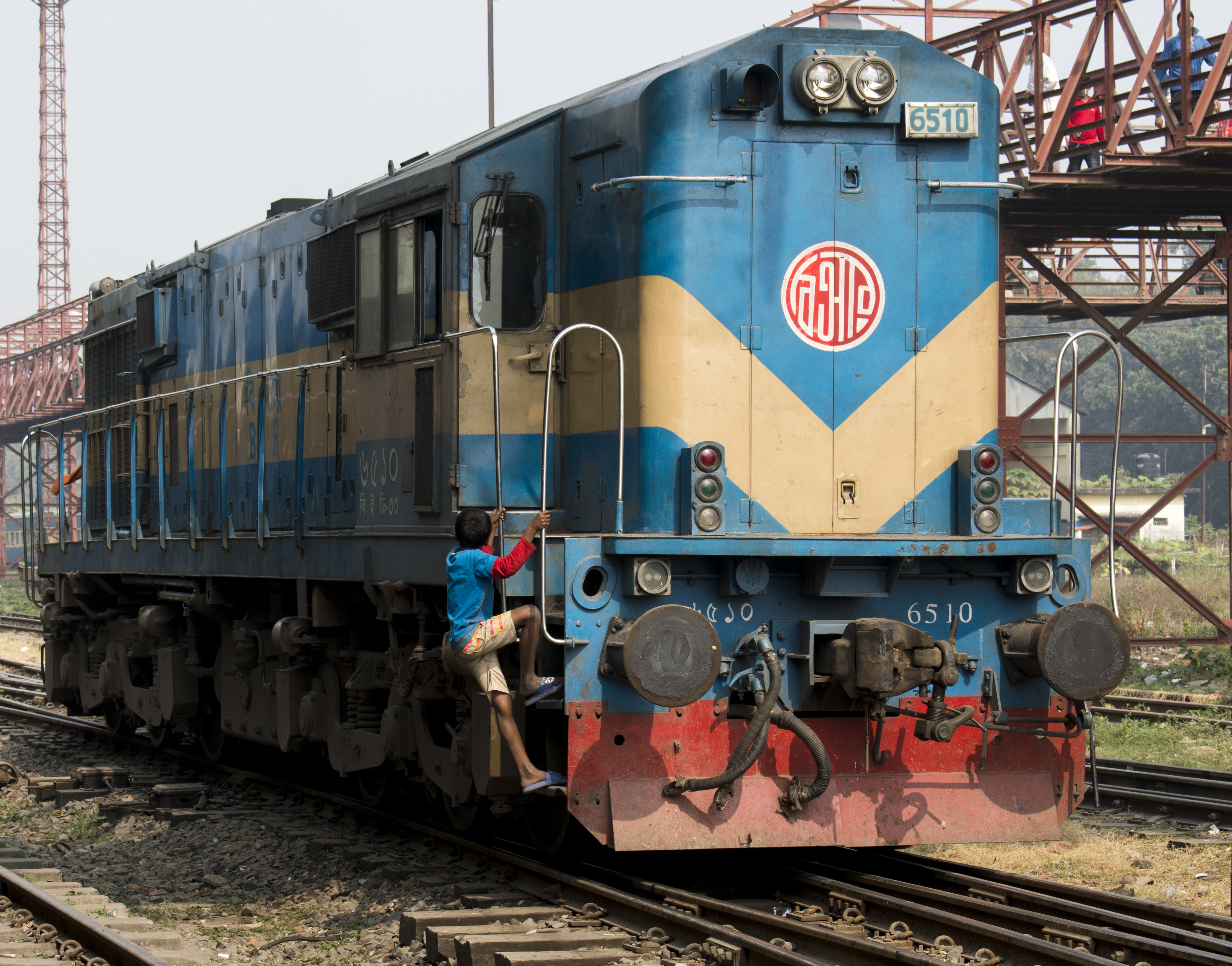 কমলাপুর রেলস্টেশন